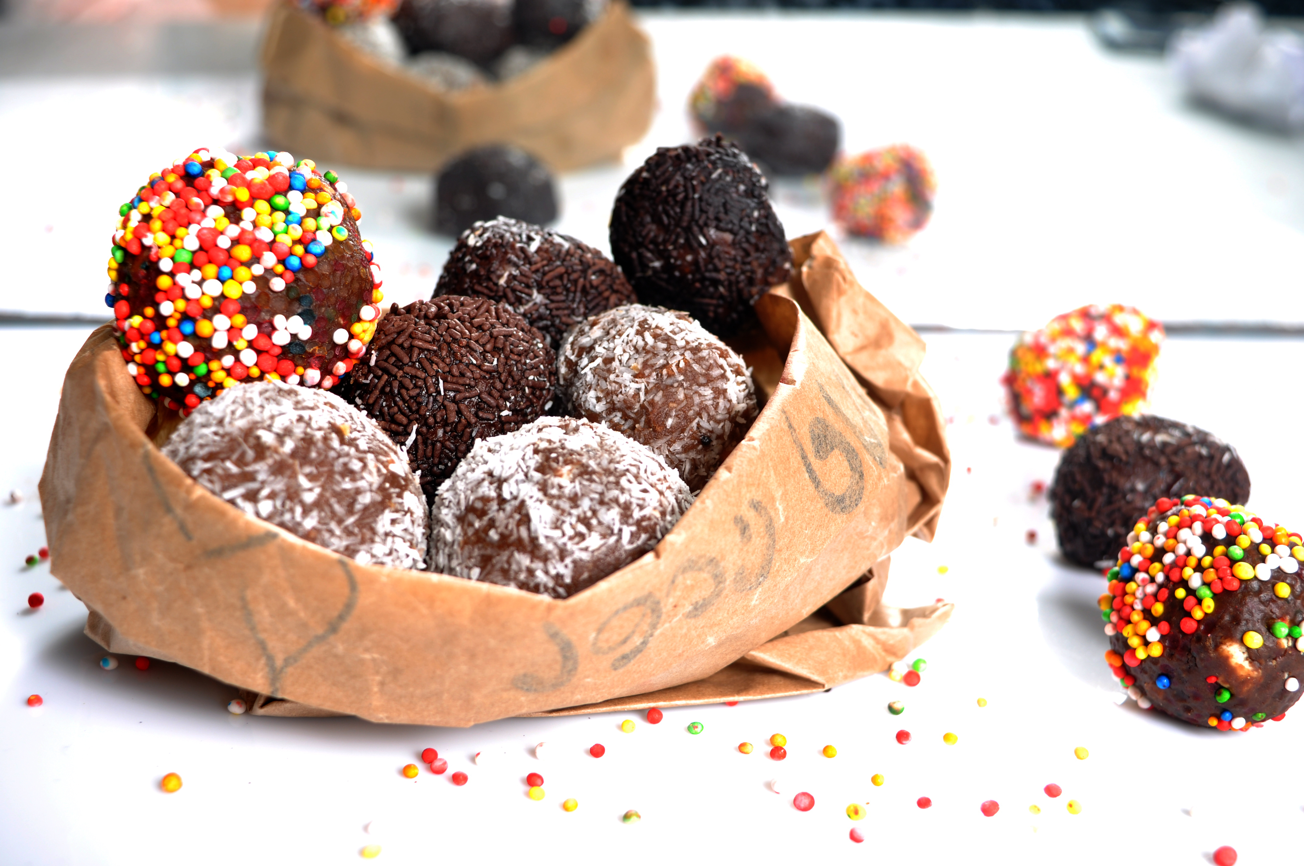 כדורי שוקולד סטודיו תיכון רוטברג